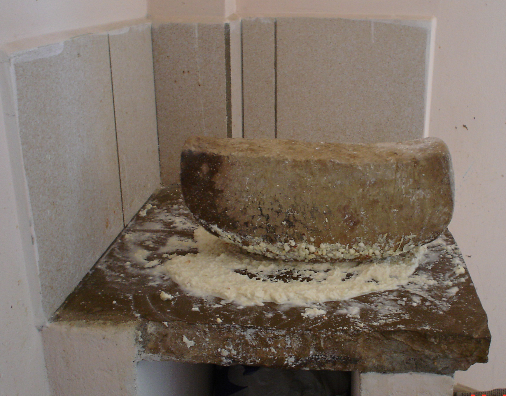 Batán, Piedra de moler